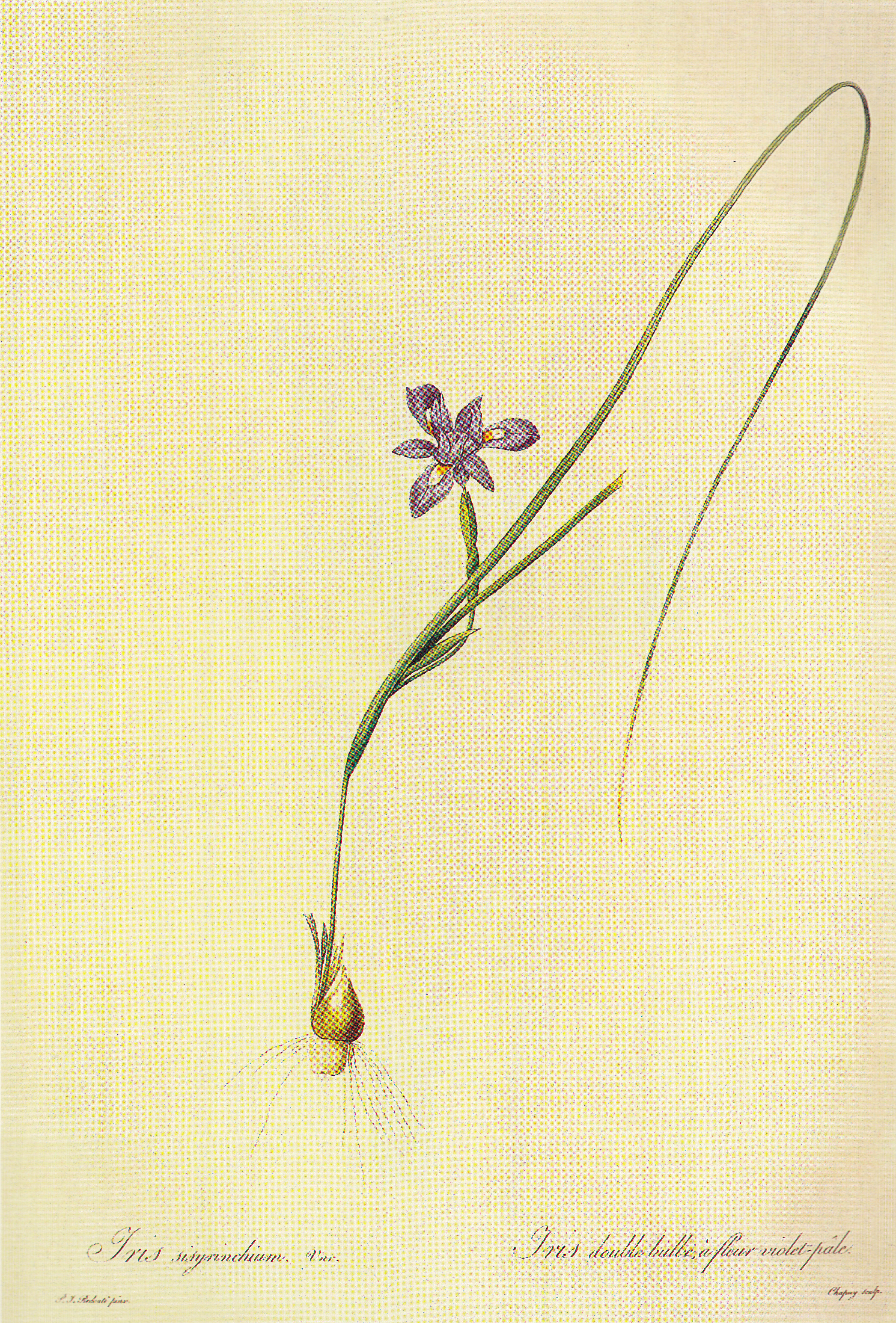 巴巴里鸢尾。原产于沿地中海地区。